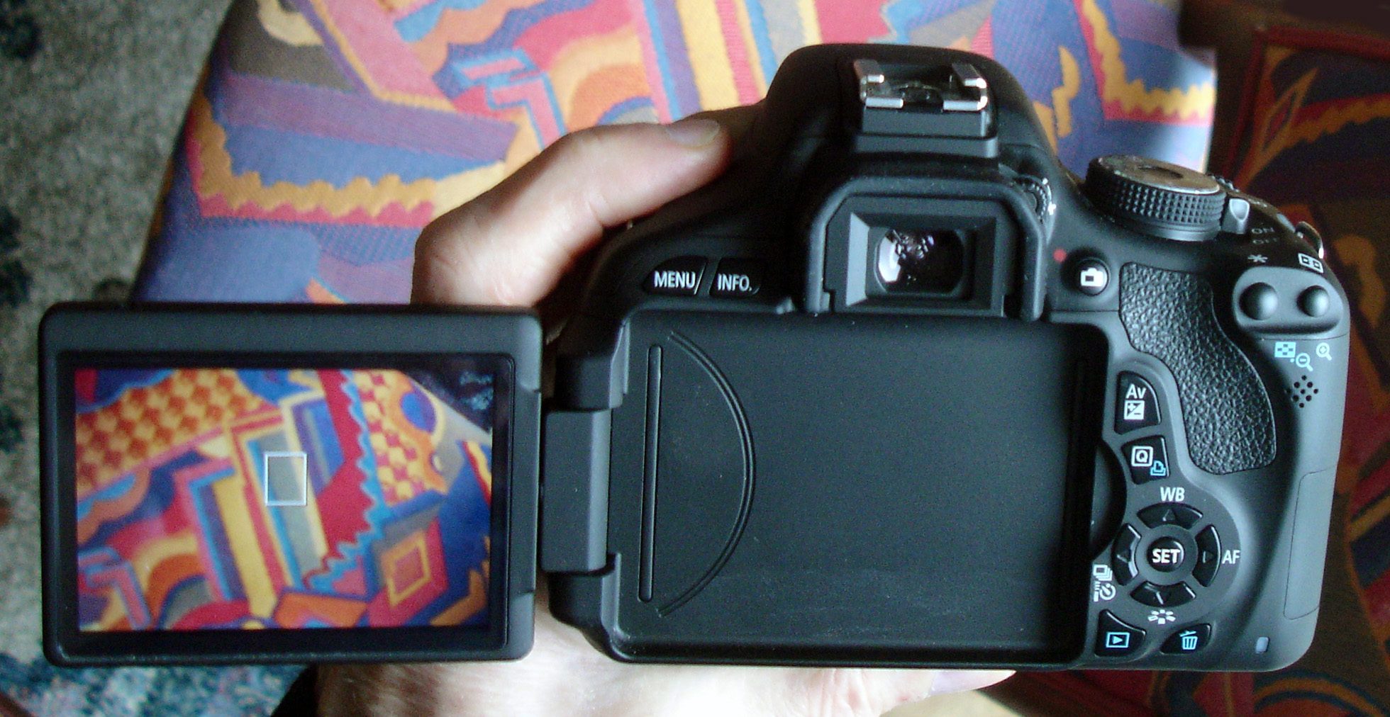 Type de viseur photographique numérique orientable.